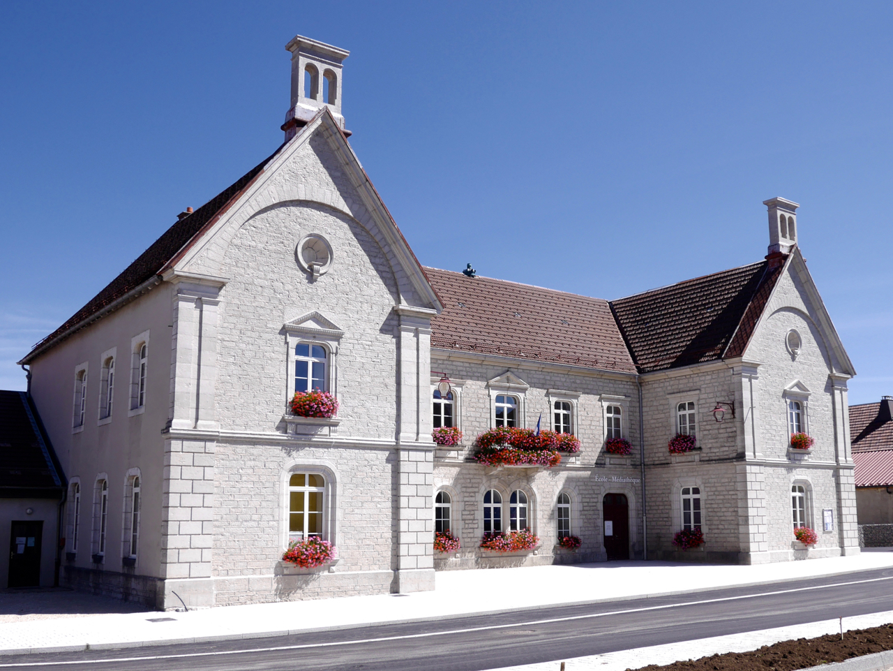 Mairie de Mignovillard